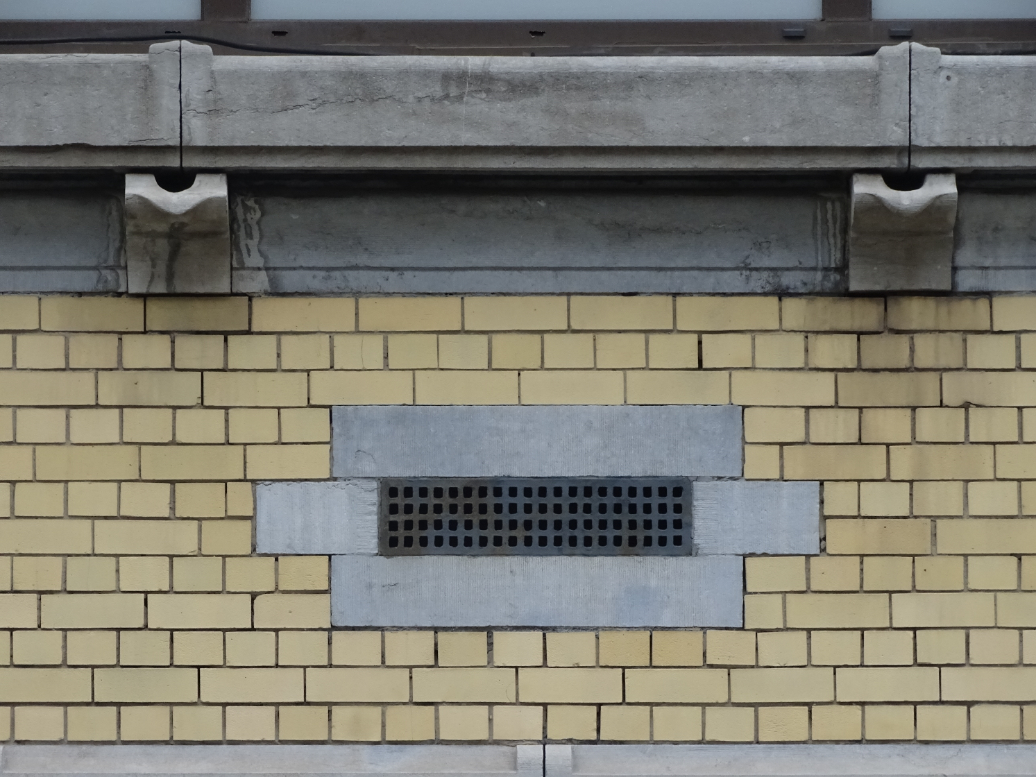 Détail de la façade de l'Institut Marius Renard, Anderlecht (1914).